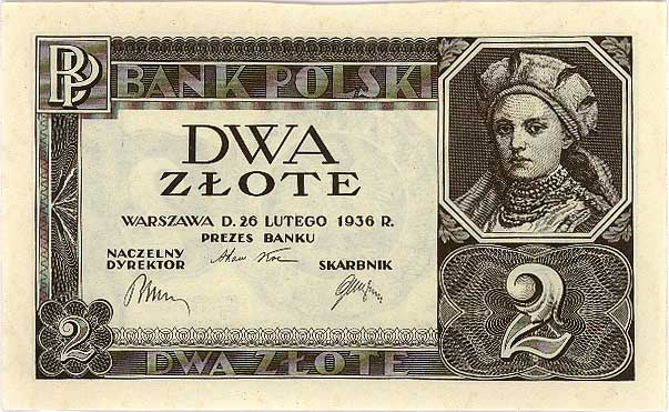 2 złote polskie, Polish currency unit from 1936